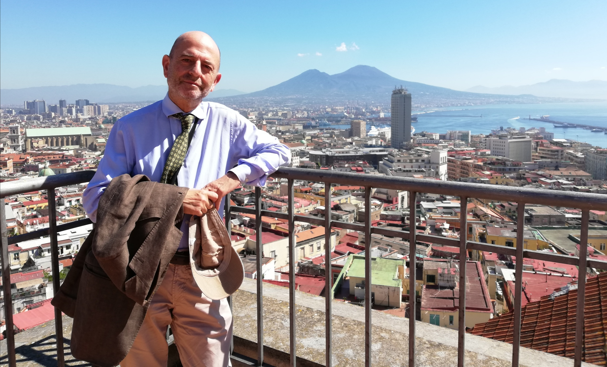 Francesco Lucrezi sul terrazzo dell'Università degli Studi Suor Orsola Benincasa